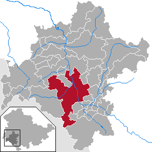 Meiningen in Thuringia - District Schmalkalden-Meiningen